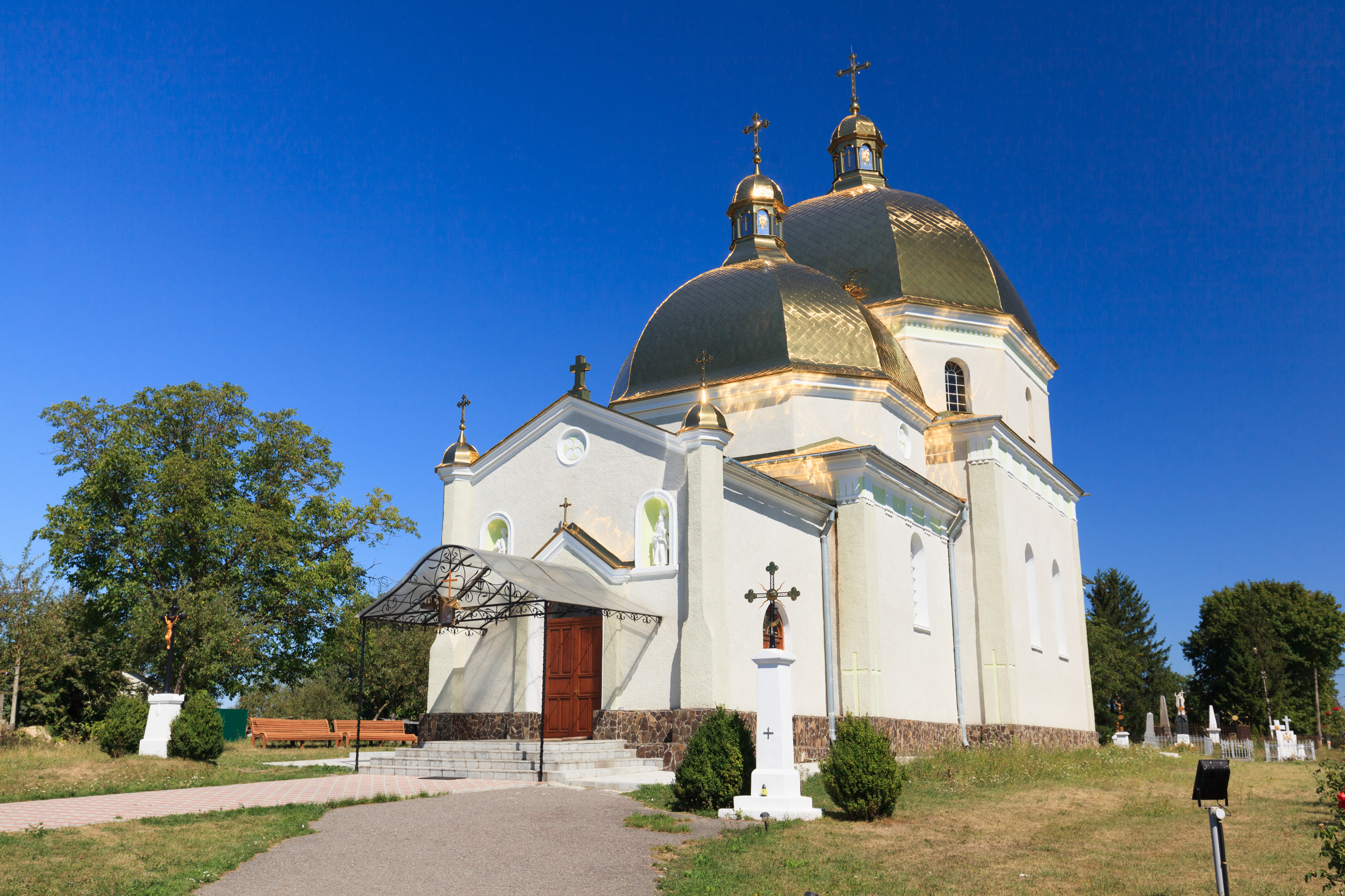 Церква Воздвиження Чесного Хреста, Ожидів